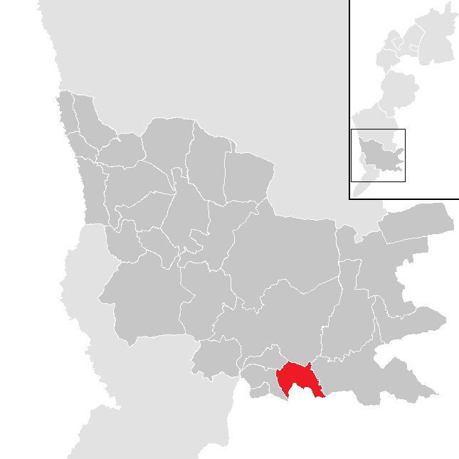 Bezirk Güssing